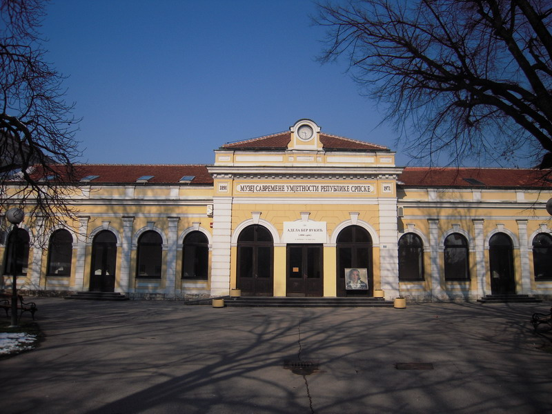 Музеј_савремене_умјетности__Републике_Српске